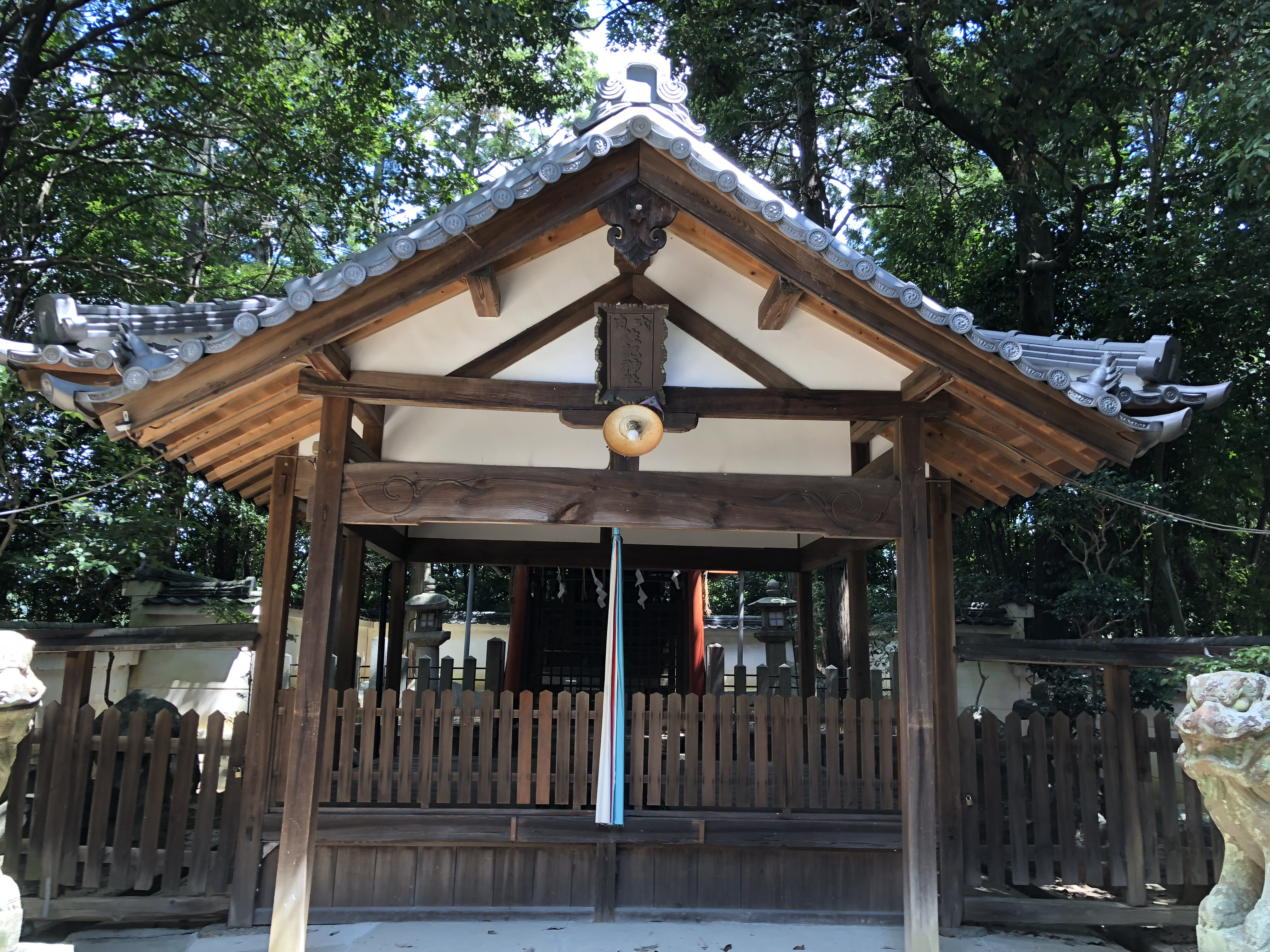 奈良市佐紀町小字亀畑 佐紀神社 拝殿